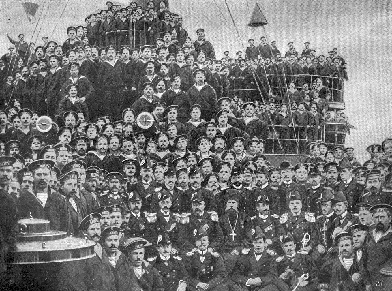 Экипаж крейсера "Олег", прорвавшегося в Маниллу